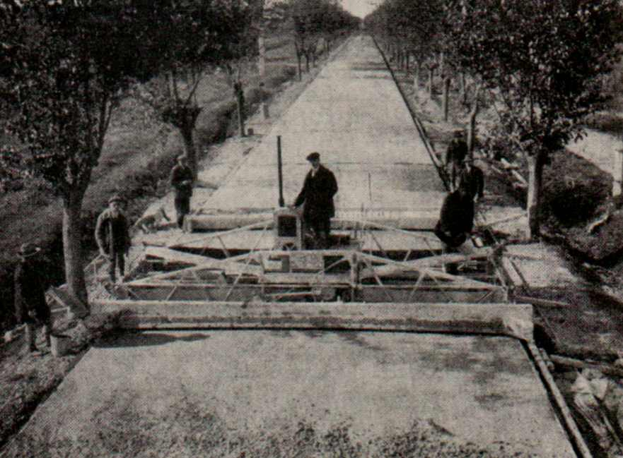 A Budapest és Bécs közötti út betonozása